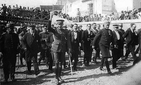 El rey Alfonso XIII de España acude al lecho del río Guadalmedina, en Málaga, para colocar la primera piedra del puente de la Aurora, en su visita a la ciudad de 1921.